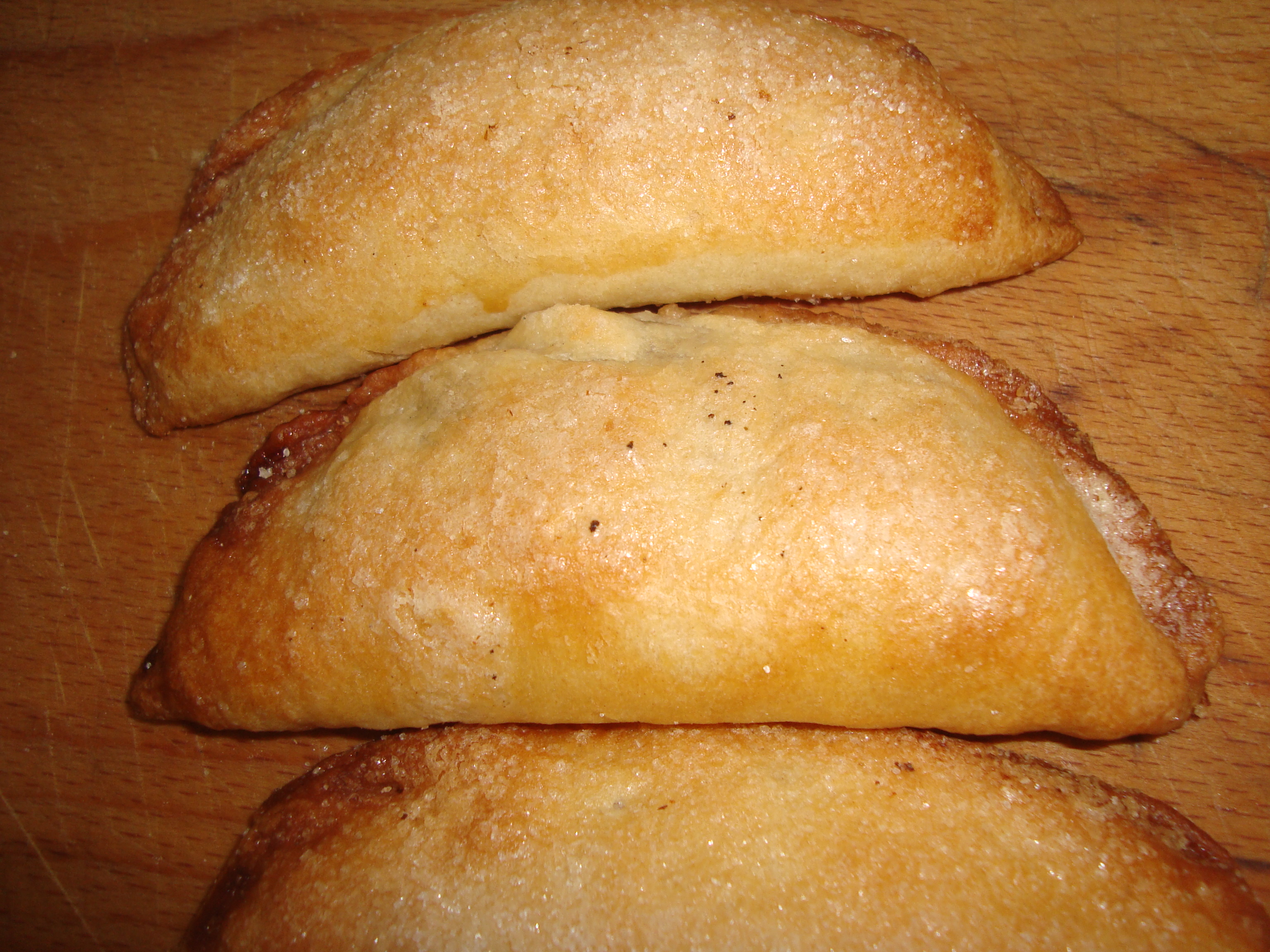 Pasteles de boniatoDulces de boniato, receta mediterránea. Reposteria popular de la província de Castellón, típico consumir pastissets en Navidad, Semana Santa y festividades.